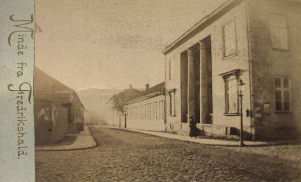 Nyttårskort. Laget for Olaf S. Madsen. Fotografi. Påtrykt tekst: "Minde fra Fredrikshald". Gatemotiv, Søylegården, Svenskegaten 10, i Fredrikshald (Halden), Østfold. Fotografering (Eksponering av selve motivet): 1918. Tilhører Norsk Folkemuseum